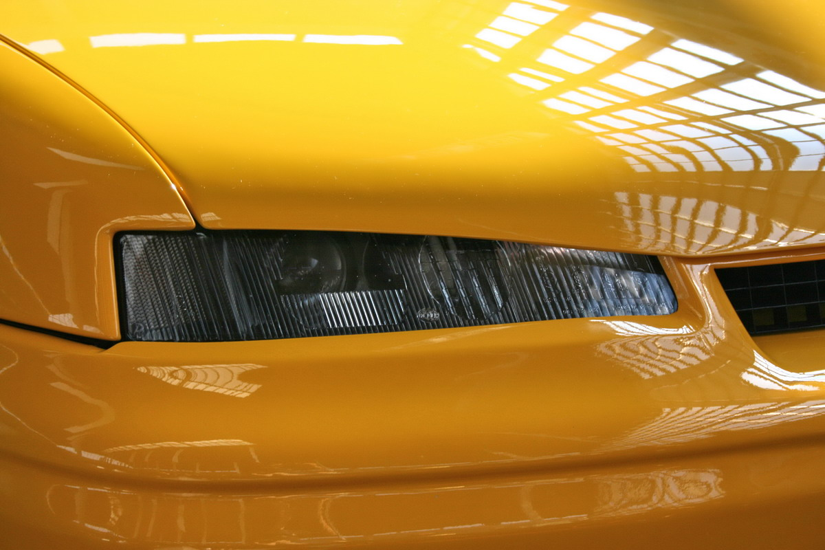 Böser Blick (Kfz) Not important ;)